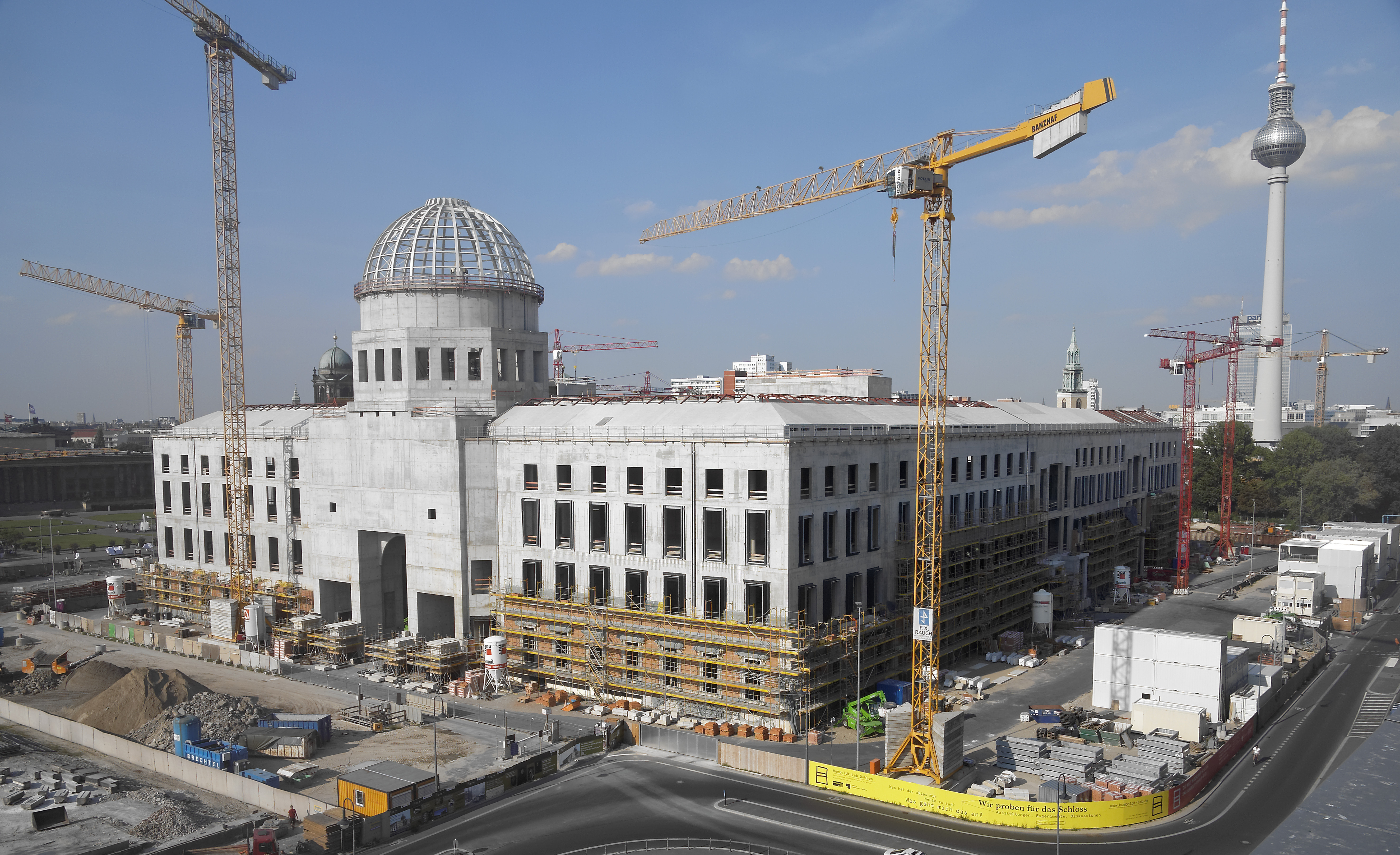 Berliner Schloss - Humboldtforum am 31. August 2015 © Stiftung Berliner Schloss – Humboldtforum / Hi.Res.Cam